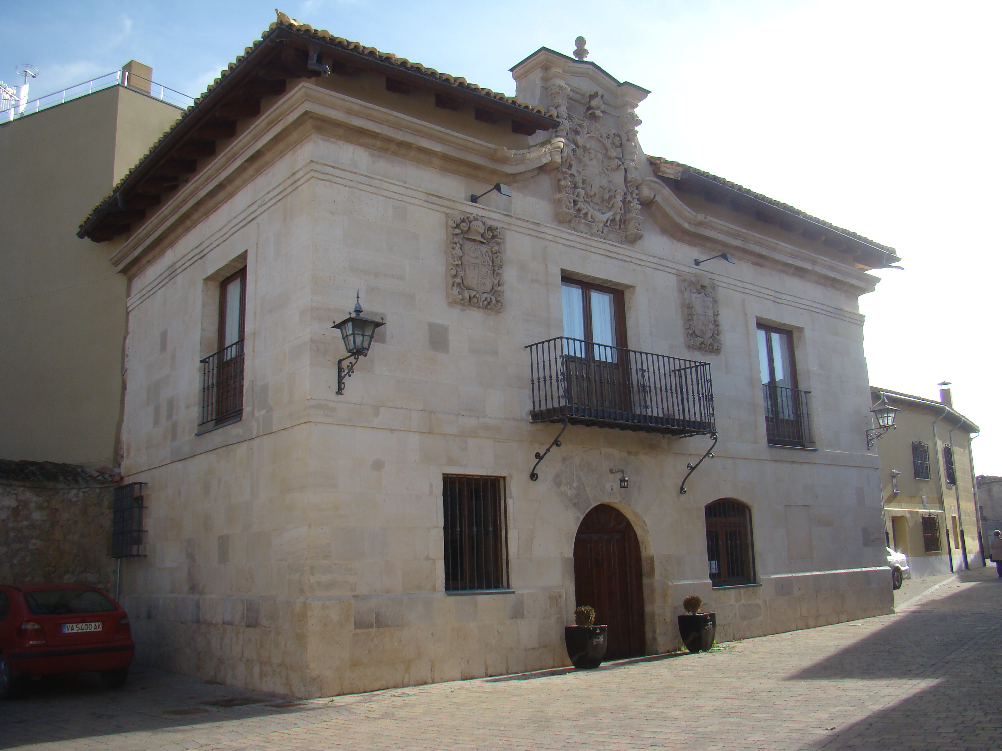 Valoria la Buena (Valladolid, España). Palacio de los Vizcondes de Valoria la Buena.